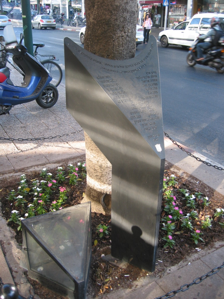 אנדרטה לזכר הרוגי הפיגוע בקו 5